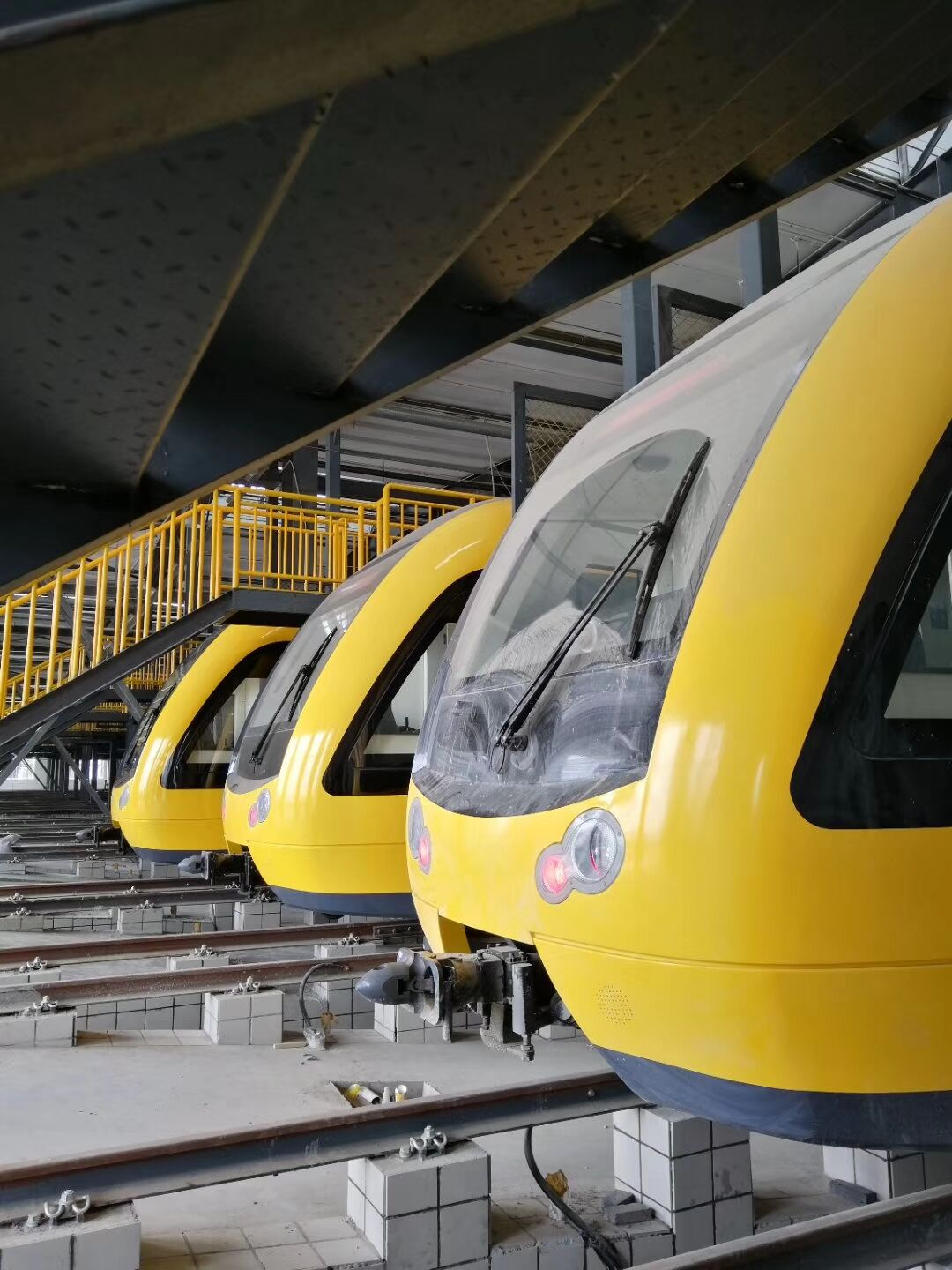 长春轨道交通北湖线太平村车辆段内景